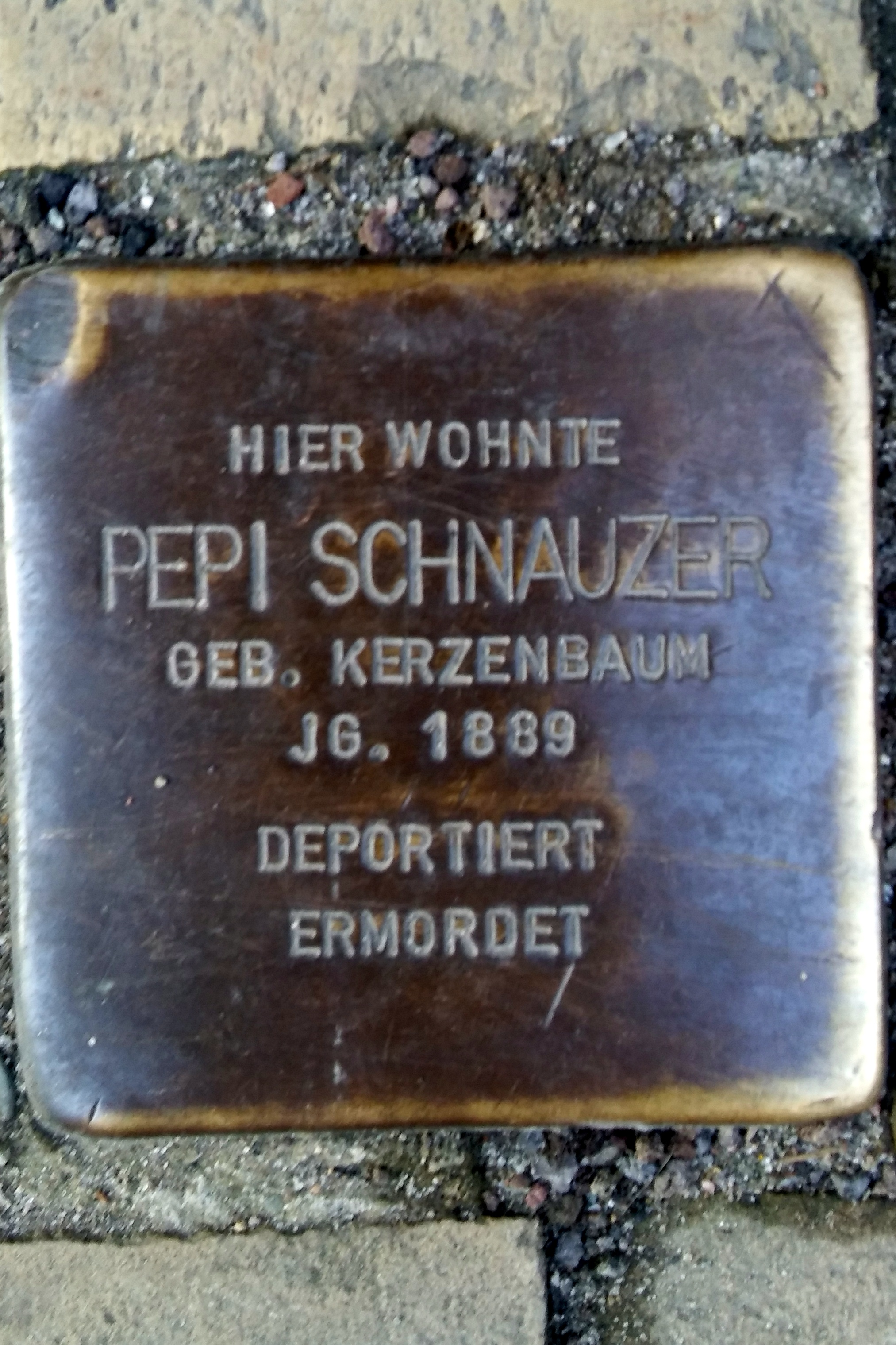 Stralsund, Frankenstraße 51, Stolperstein Pepi Schnauzer